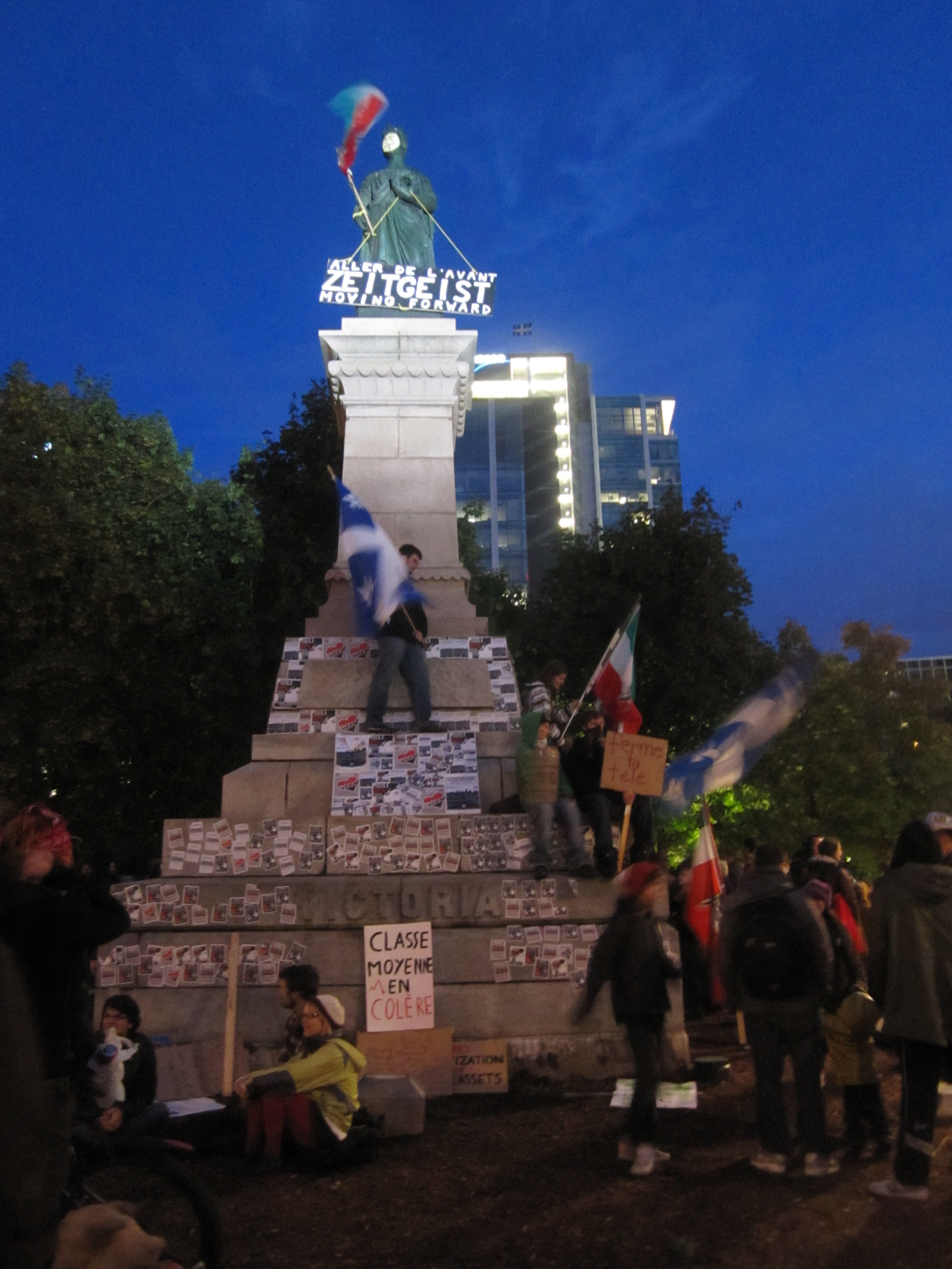 Photo d'Occupons Montréal, inspiré de Occupy Wall Street. Les manifestants occupent le Square Victoria. La statut de la reine Victoria a été « redécorée » par les manifestants. On remarque qu'on lui a mis un masque de Guy Fawkes, signe du collectif Anonymous, ainsi qu'une affiche faisant la promotion du mouvement Zeitgeist.